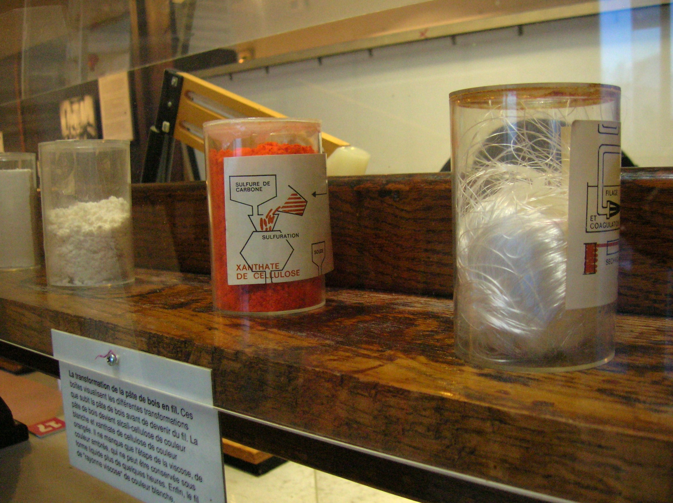 Musée de la viscose, Échirolles, Isère, France.Transformation de la pâte de bois en fil. La pâte de bois dévient alcali - cellulose (blanche) et xantathe de cellulose (orange). Le "rayonne viscose" (blanc).